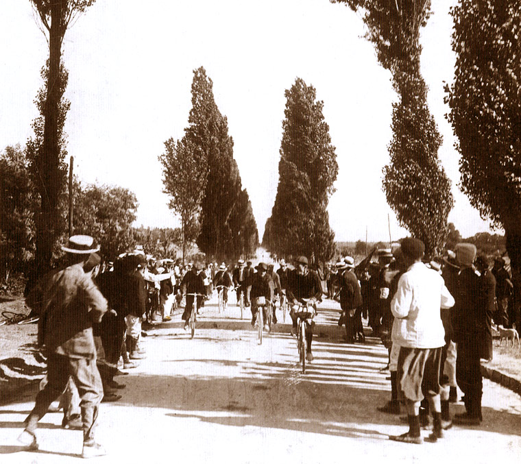 Tour de France 1903. Finish in Bordeaux. The foreign winner of a stage first in the history Swiss Charles Laeser. Das Ziel in Bordeaux. Erster in der Geschichte der ausländische Sieger der Etappe der Schweizer Charles Laeser. Le finish à Bordeaux. Le premier à l'histoire le vainqueur étranger de l'étape le Suisse Charles Laeser. La meta en Bordeaux. El vencedor extranjero, primer en las historias, de la etapa el suizo Charles Laeser. Финиш в Бордо. Первый в истории иностранный победитель этапа швейцарец Charles Laeser.